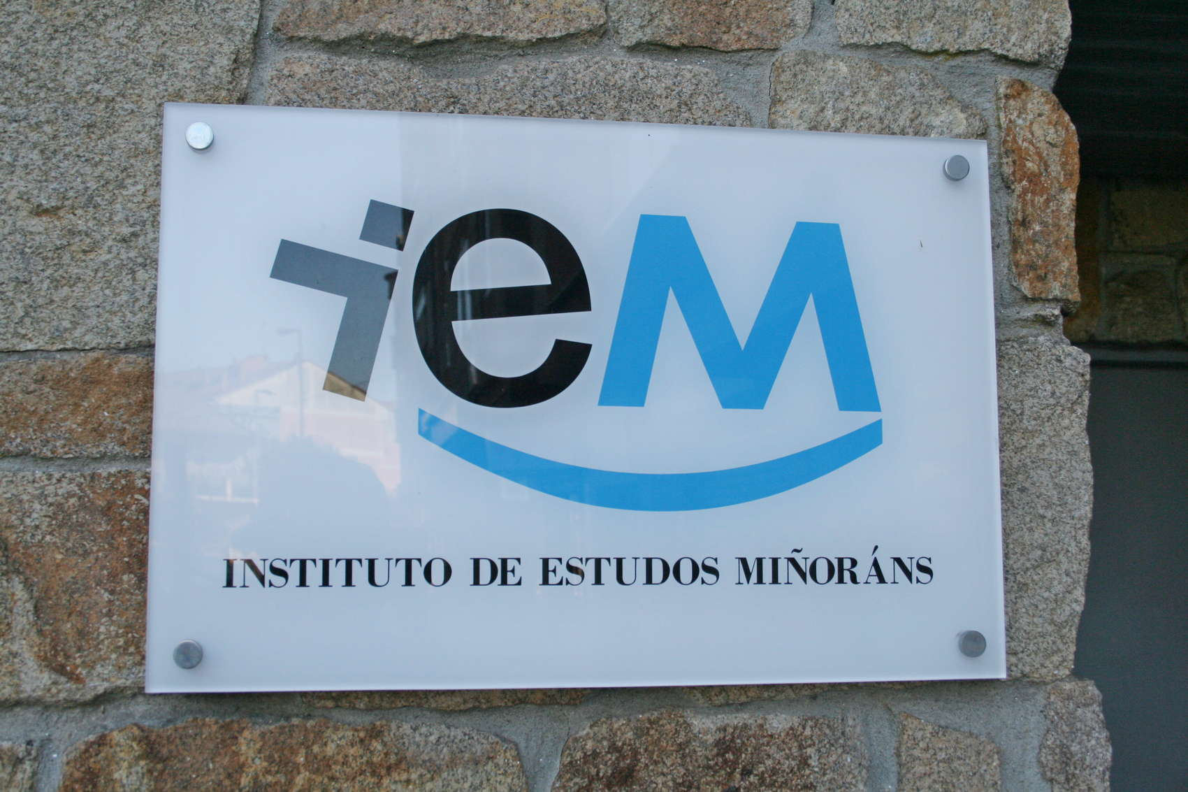 IEM (Instituto de Estudios Miñoranos)